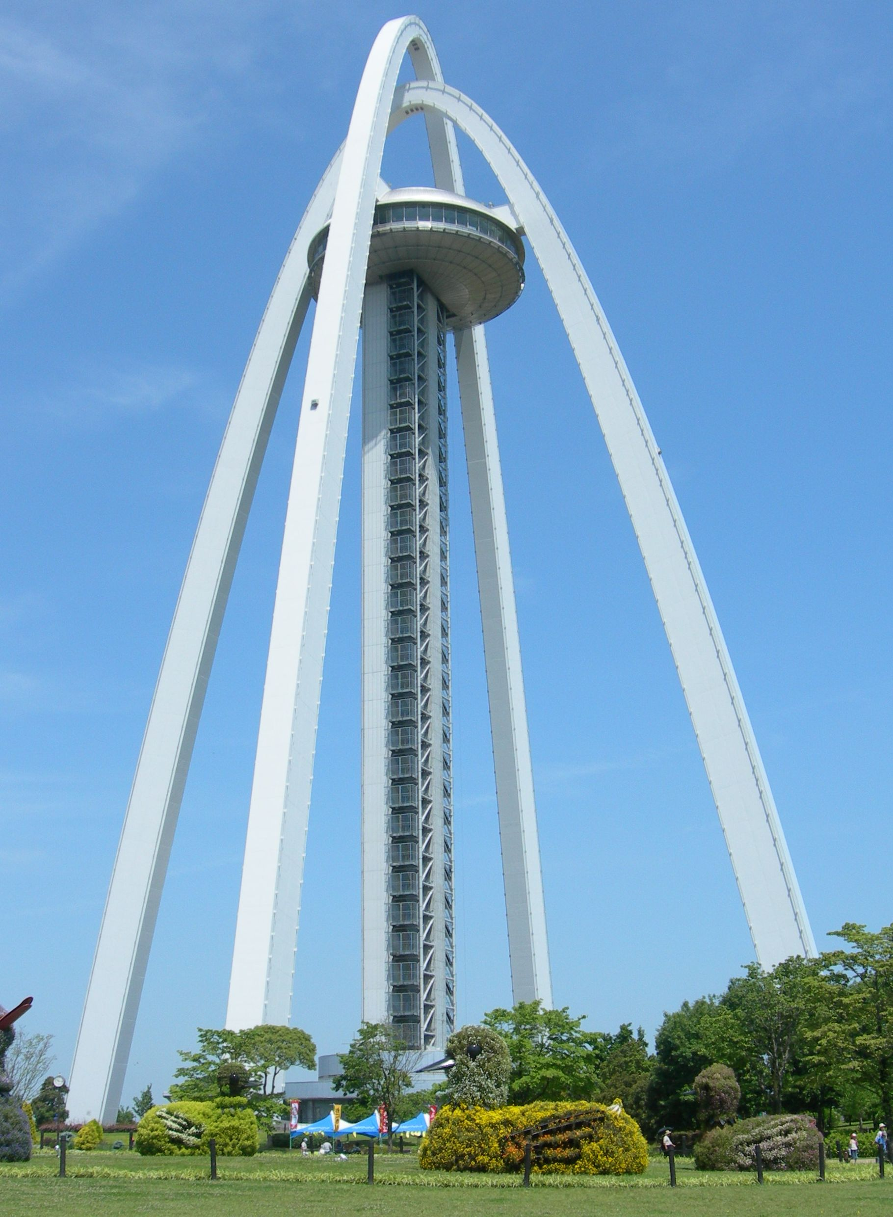 ツインアーチ138